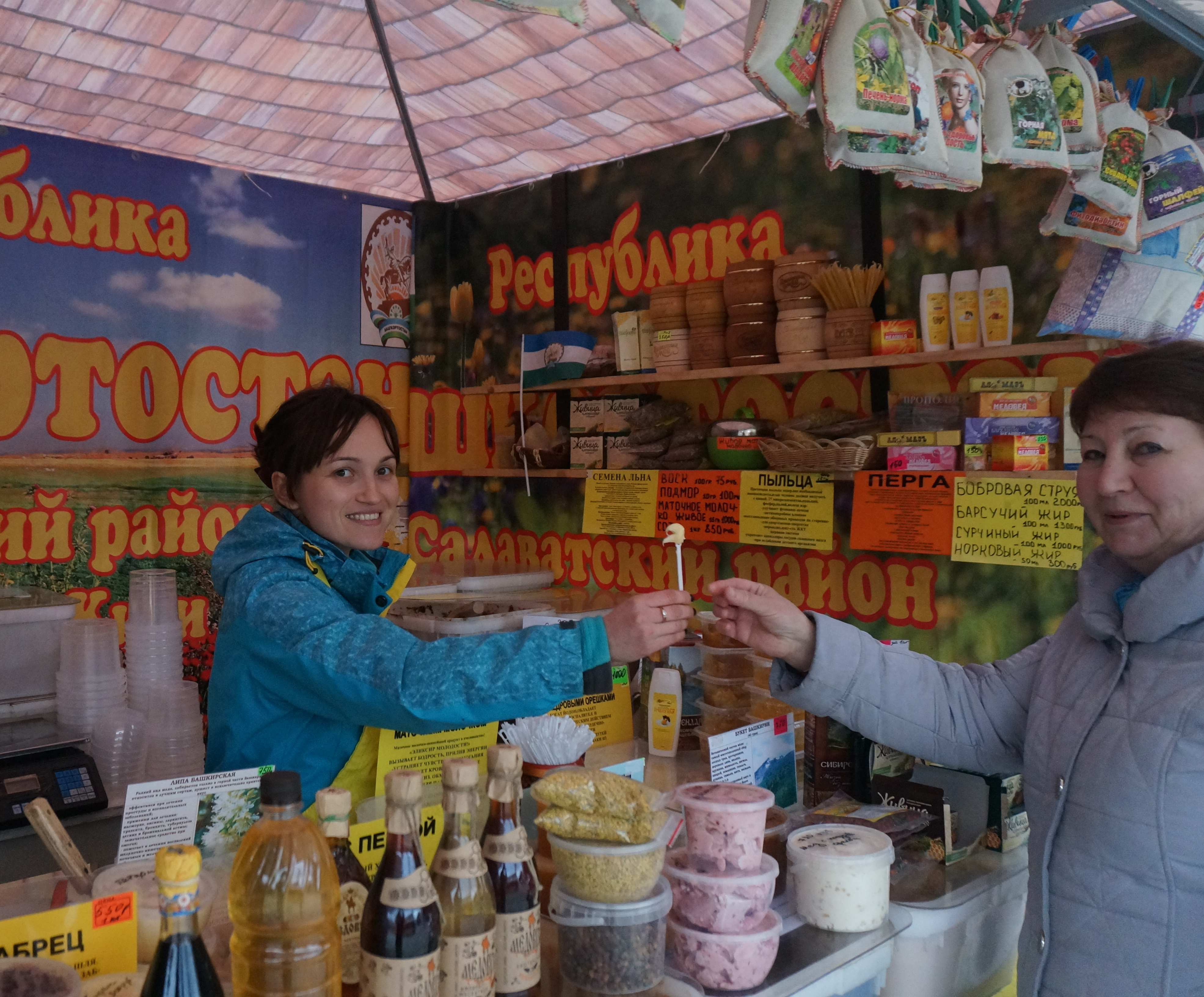 Башҡортса: Башҡорт балы магазины, Ялта.